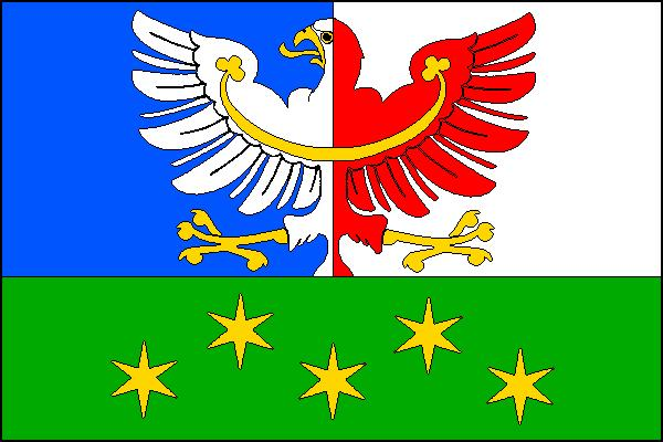 Vlajka obce Chlum